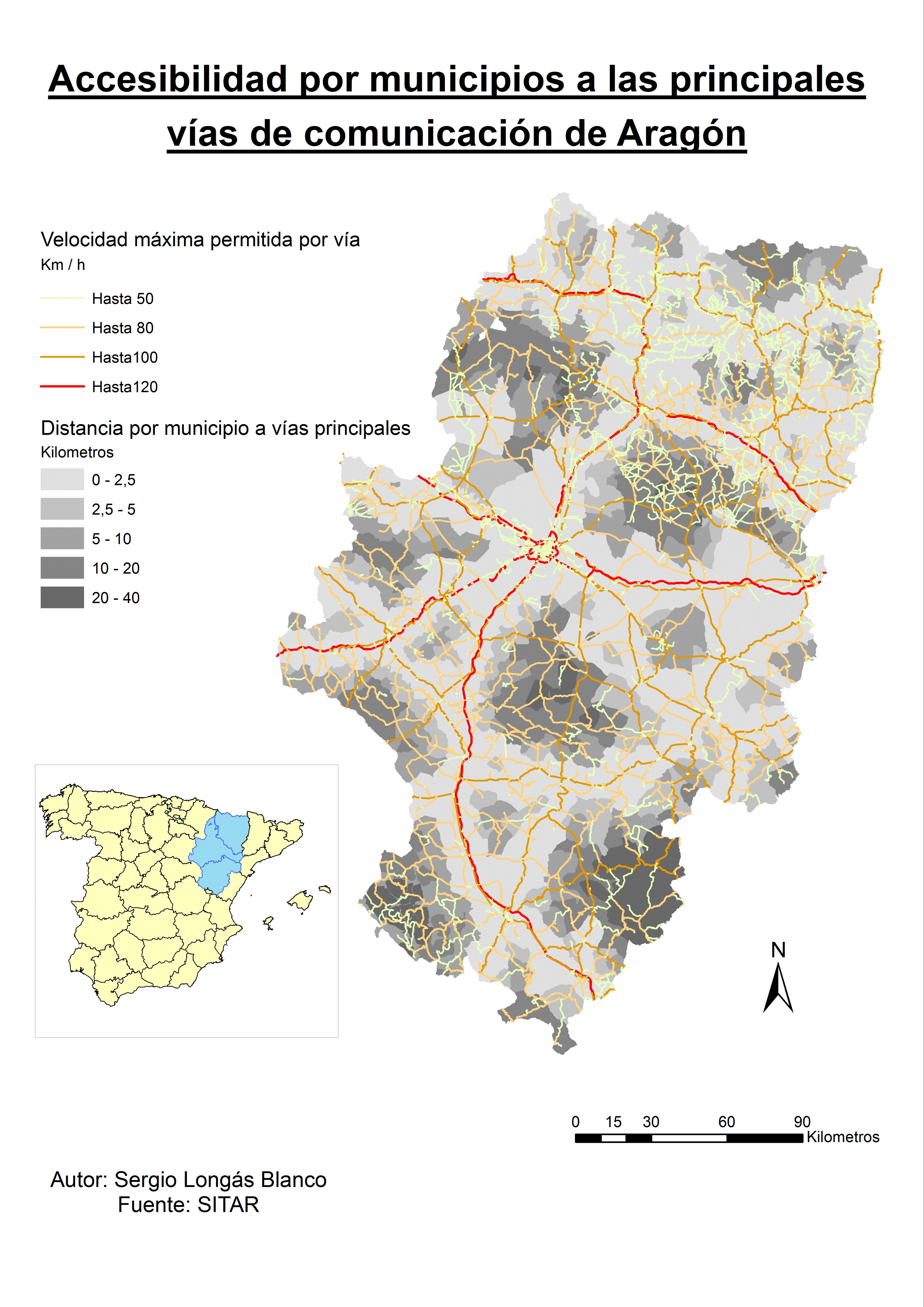 Mapa de acceso a las principales vias de comunicación de Aragón